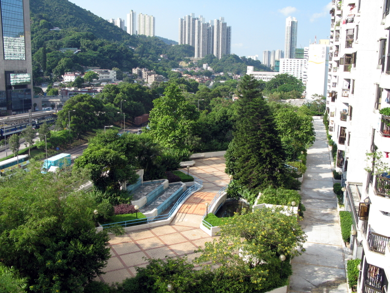 Shatin Plaza Garden